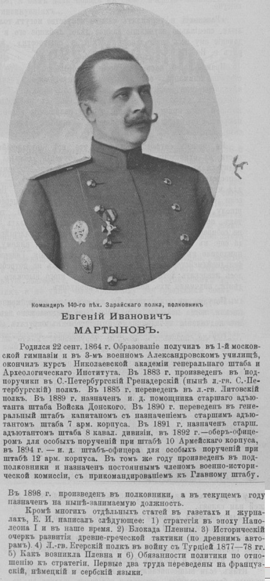 Мартынов, Евгений Иванович. Фото ст. в журн. "Разведчик" №732, 1904 год